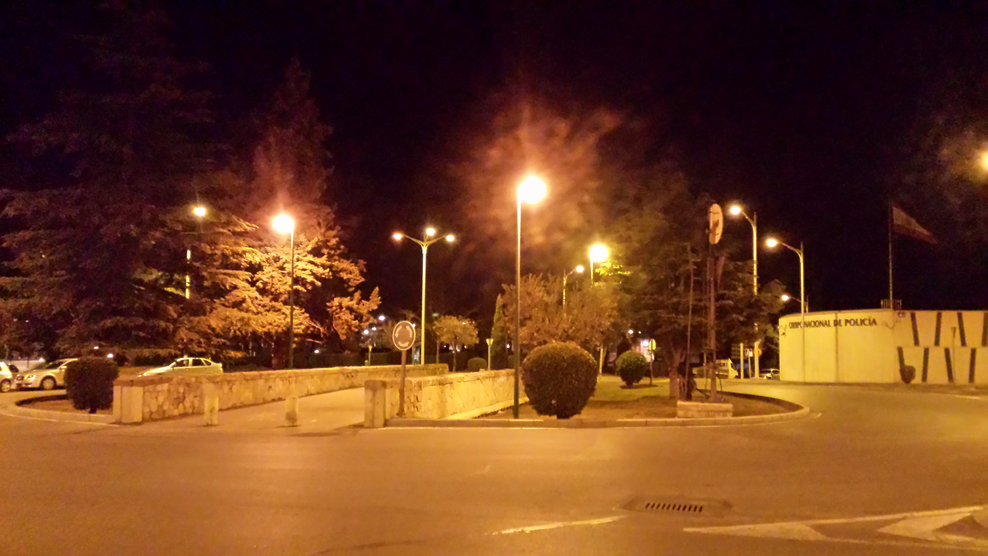 Puente de Madera